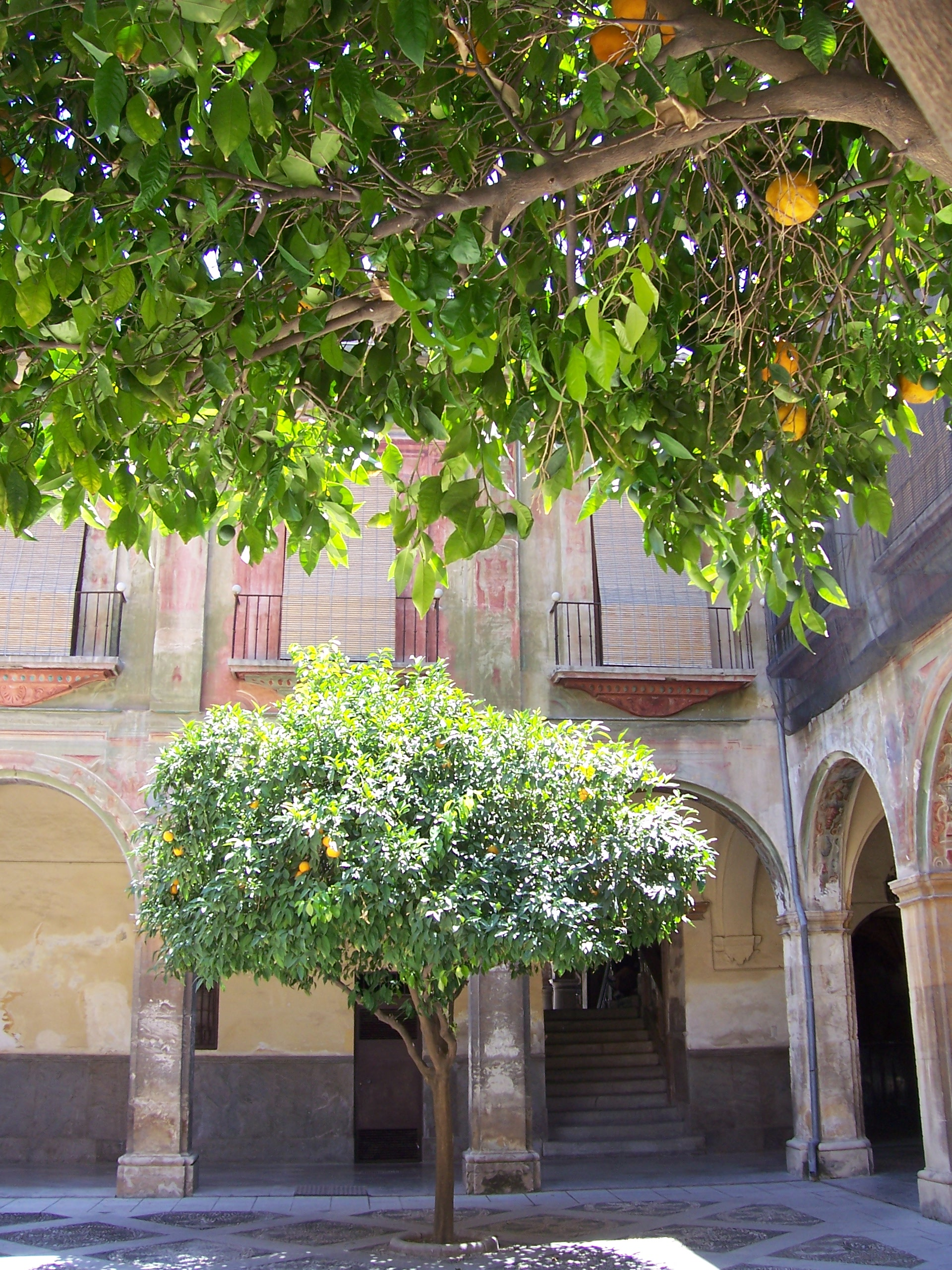 orangers d'andalousie - Granada